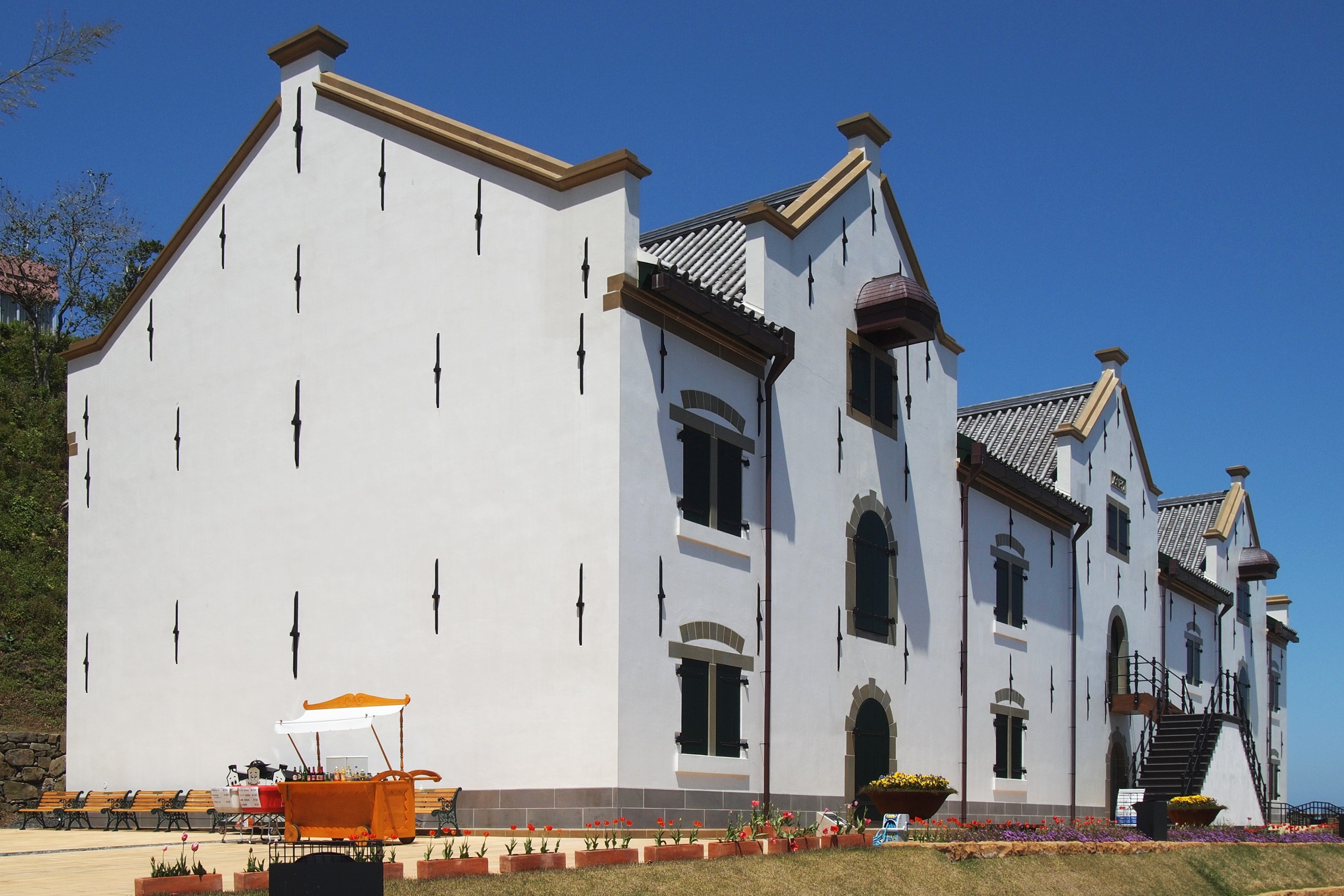 復元された平戸オランダ商館倉庫（長崎県平戸市）。